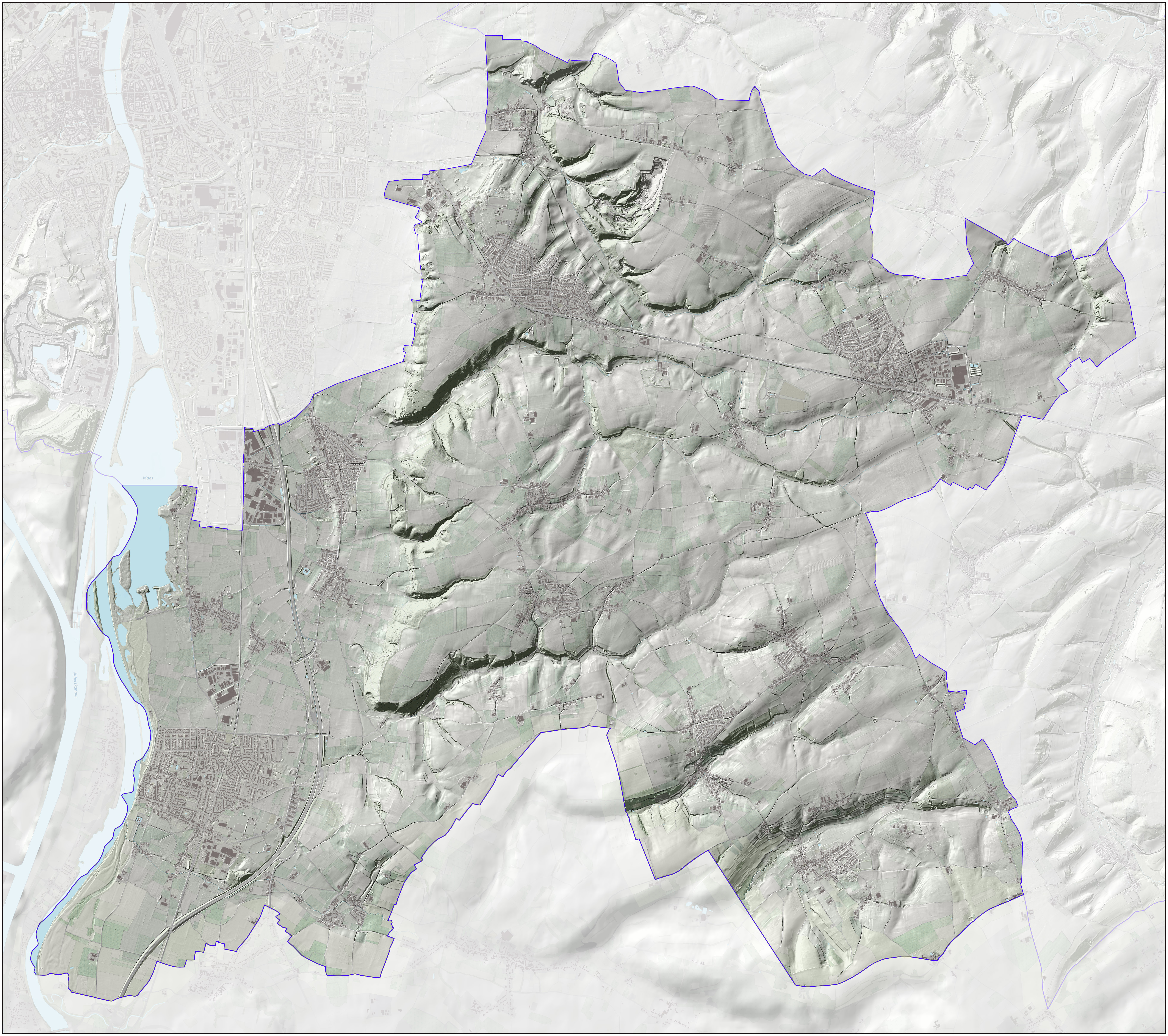 Reliëfbeeld van de gemeente, o.b.v. het Actuele Hoogtebestand Nederland (AHN2, open data) met subtiele elementen uit de Basisregistratie Topografie (BRT/Top10NL, open data). Kaartbeeld samengesteld door Jan-Willem van Aalst.